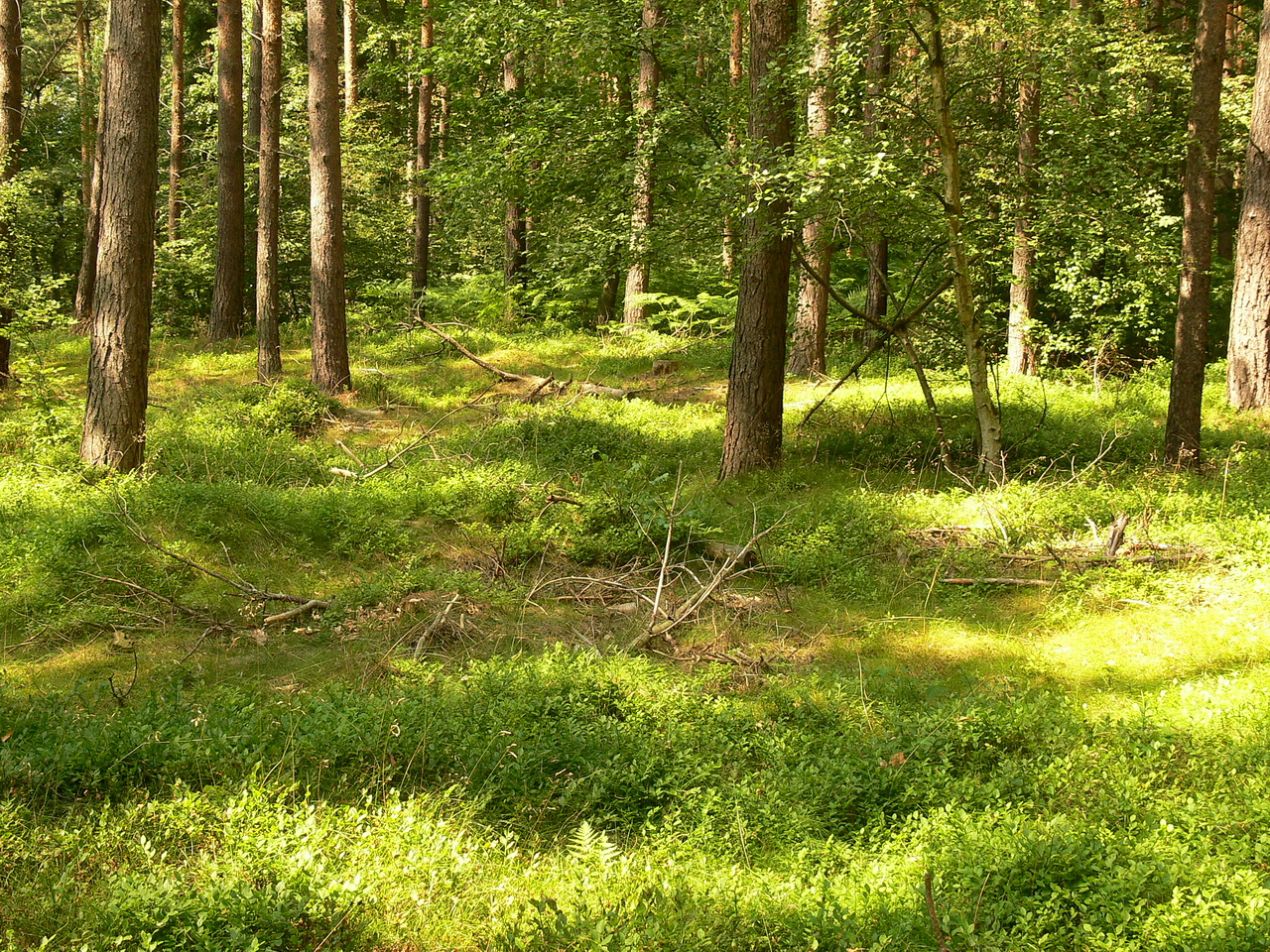 Waldboden im Gelbensander Forst - forest soil